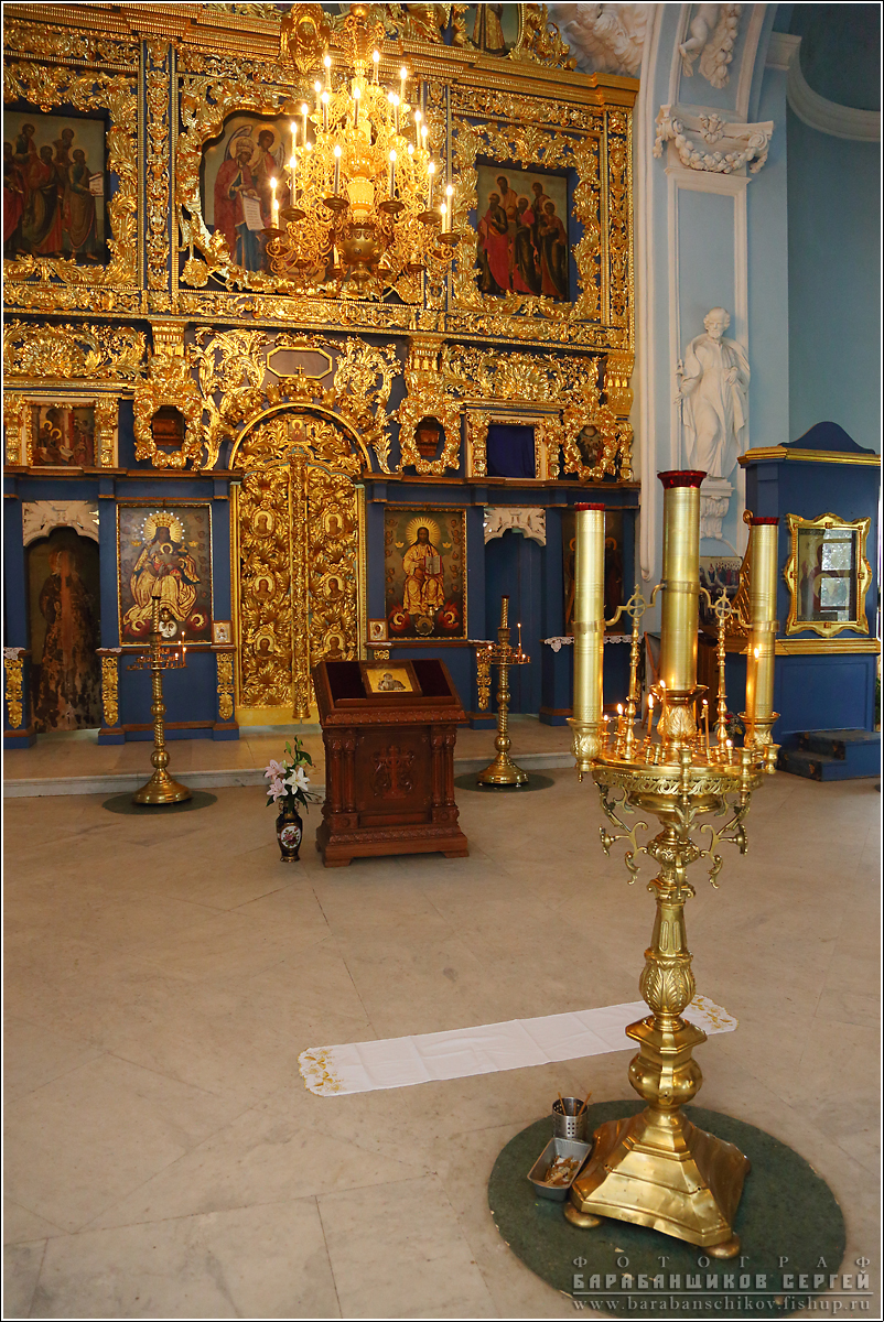 Знаменская церковь (Дубровицы) интерьер 2